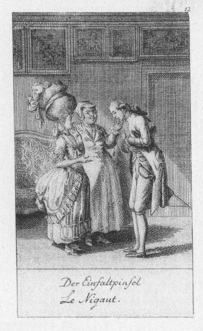 Heirathsanträge. Zweite Folge. (Beschreibung lt. Quelle) Blatt 1 Blatt 2 Blatt 3 Blatt 4 Blatt 5 Blatt 6 Blatt 7 Blatt 8 Blatt 9 Blatt 10 Blatt 11 Blatt 12 der Serie